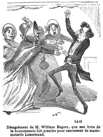 "Désagrément de M. William Rogers, que son livre de la buccomancie fait prendre pour successeur de mademoiselle Lenormand."